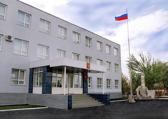 Штаб 201-й российской военной базы в Таджикистане